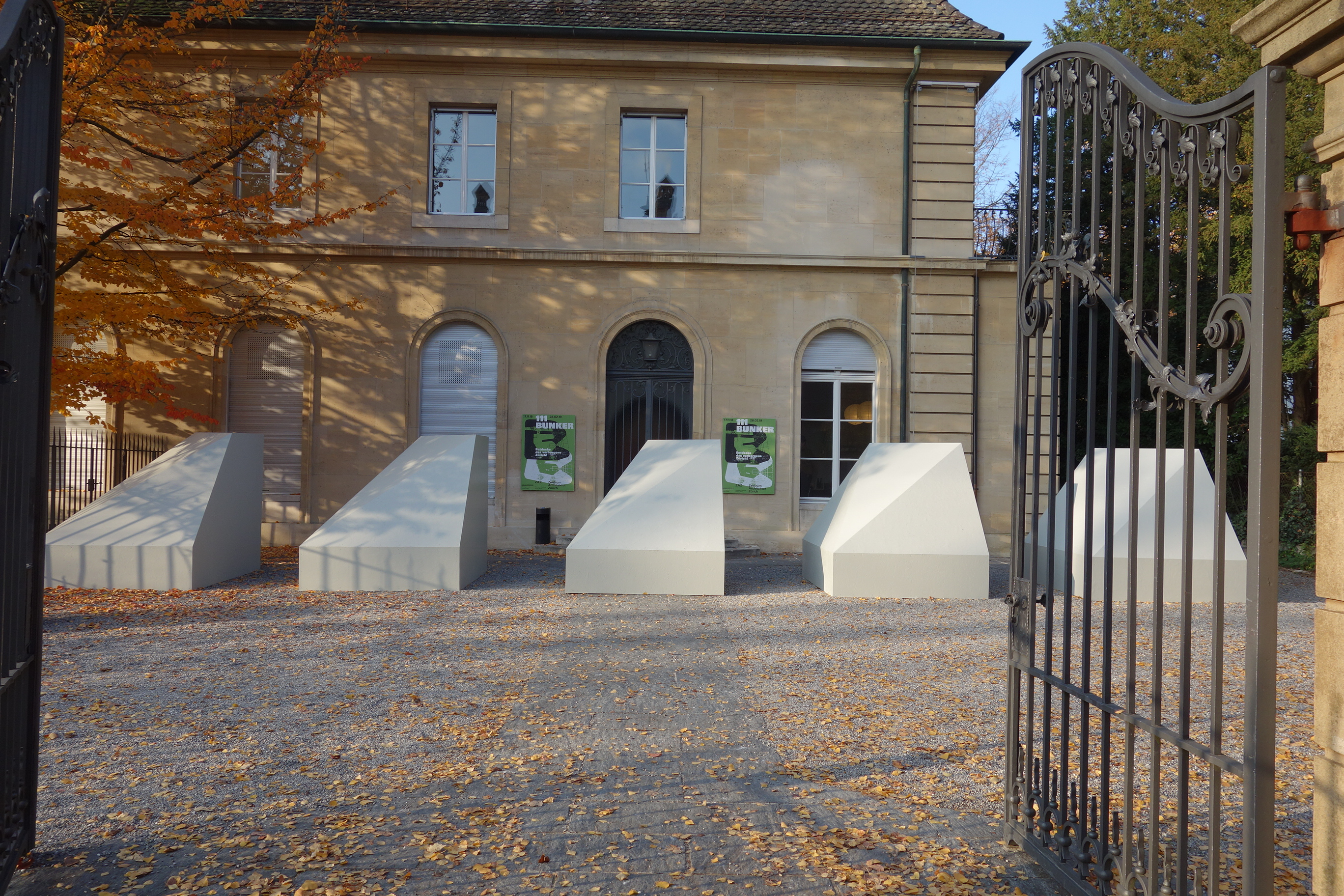 Museum Bellerive, Zürich Schweiz: 111 Bunker, Ausstellung 2018/19